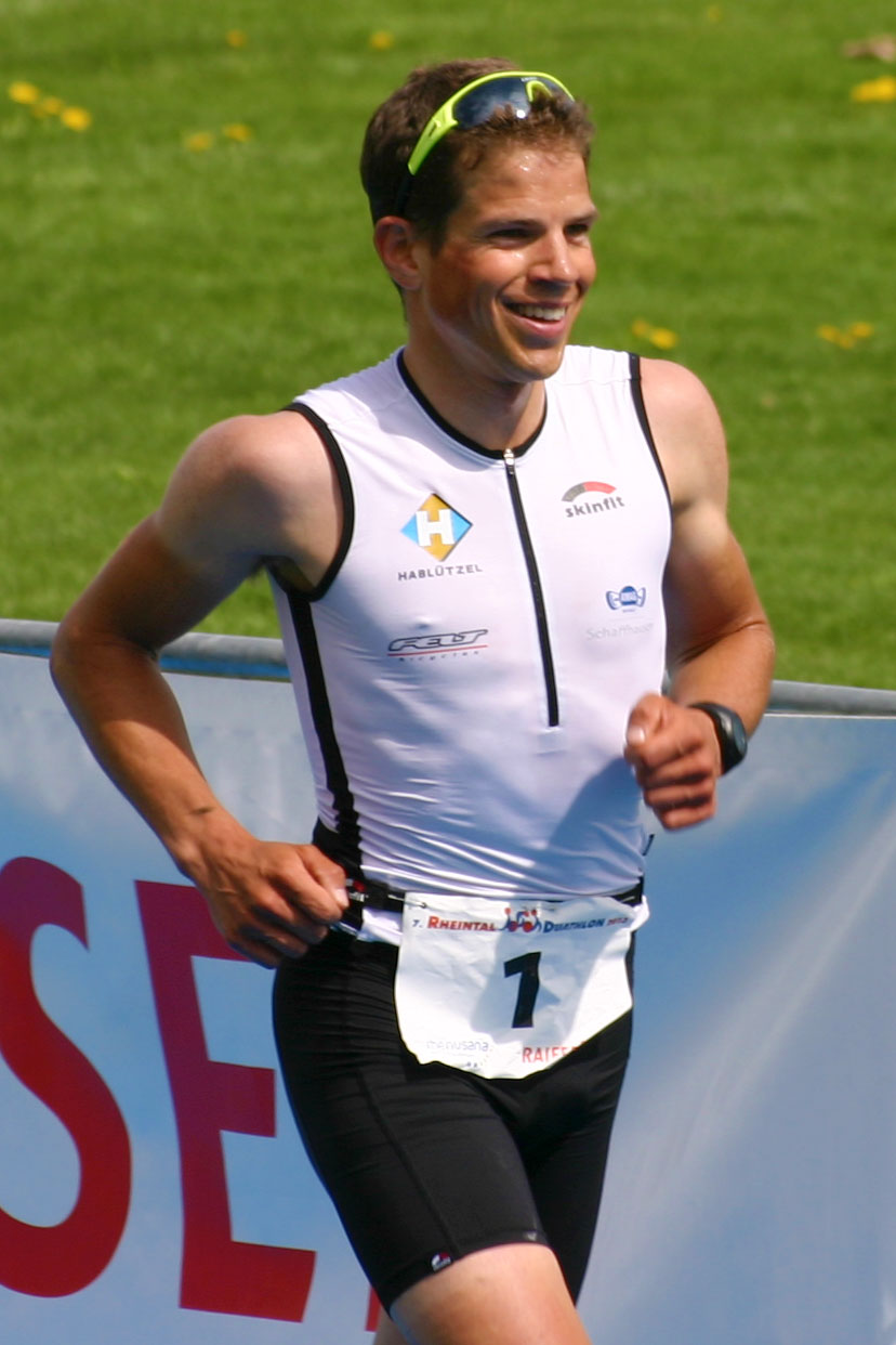 Andy Sutz beim Rheintal Duathlon